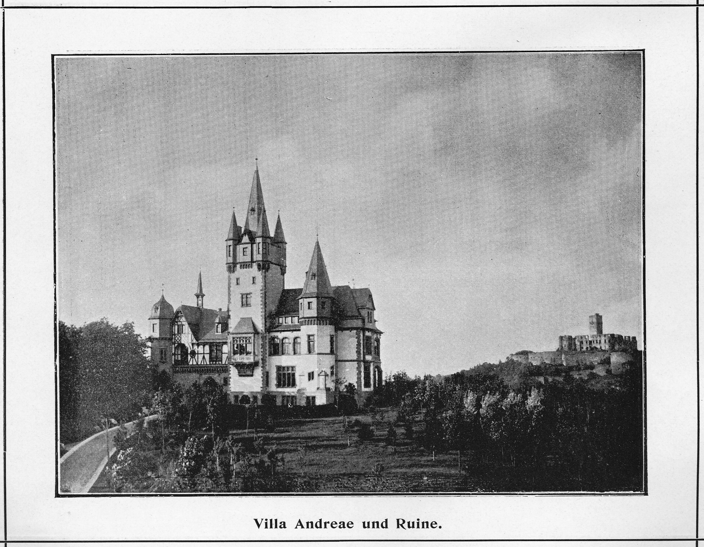 Die Villa Andreae von Albert Andreae de Neufville kurz nach ihrer Fertigstellung. Im Hintergrund die Burgruine.